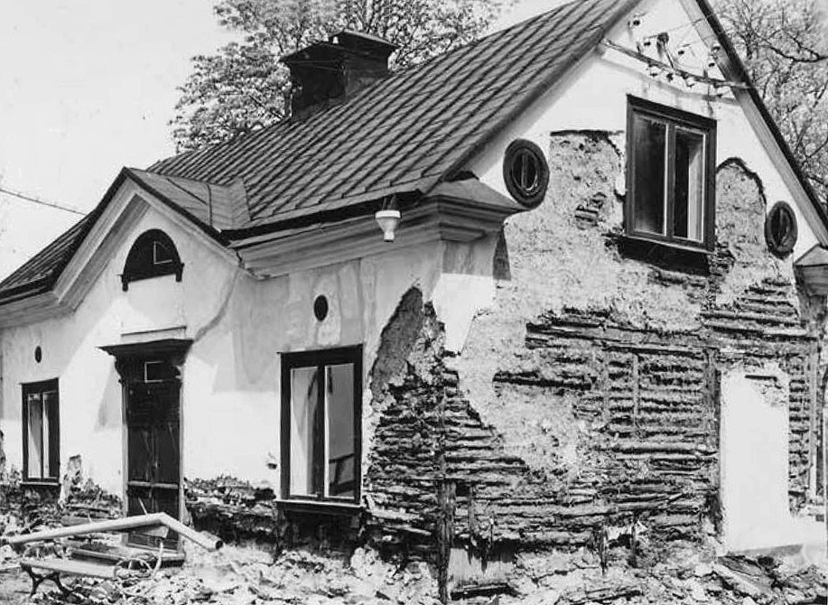 Karlshälls östra flygel under renovering i början av 1950-talet